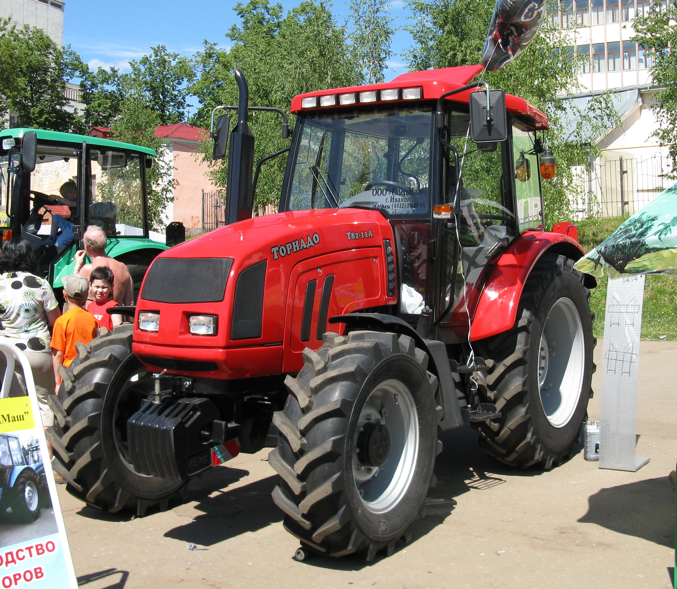 Трактор «Торнадо» производства компании «СпецМаш» (Иваново, 2009 год).